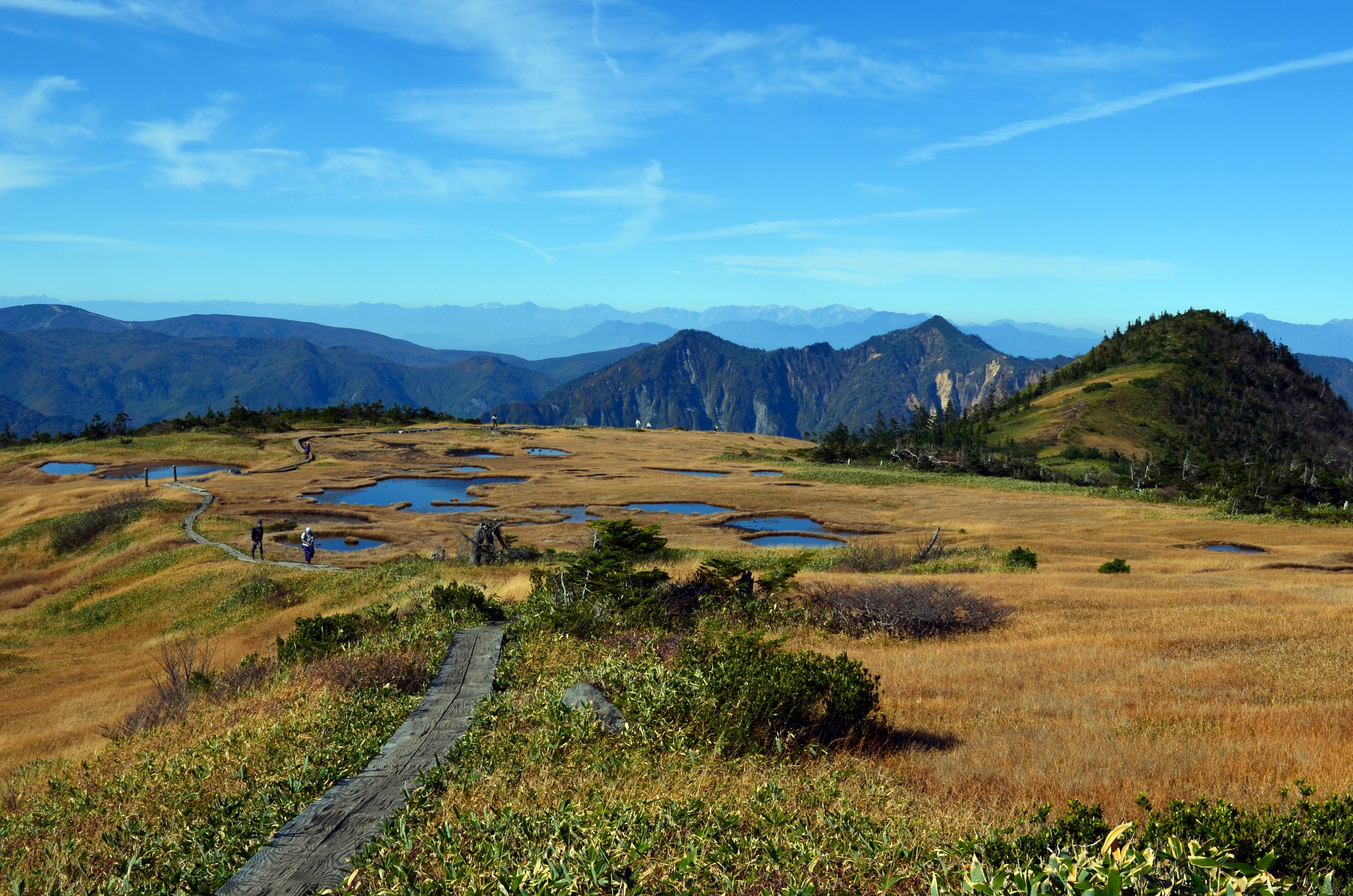 晩秋の苗場山山頂湿原。遠景は鳥甲山と北アルプス。